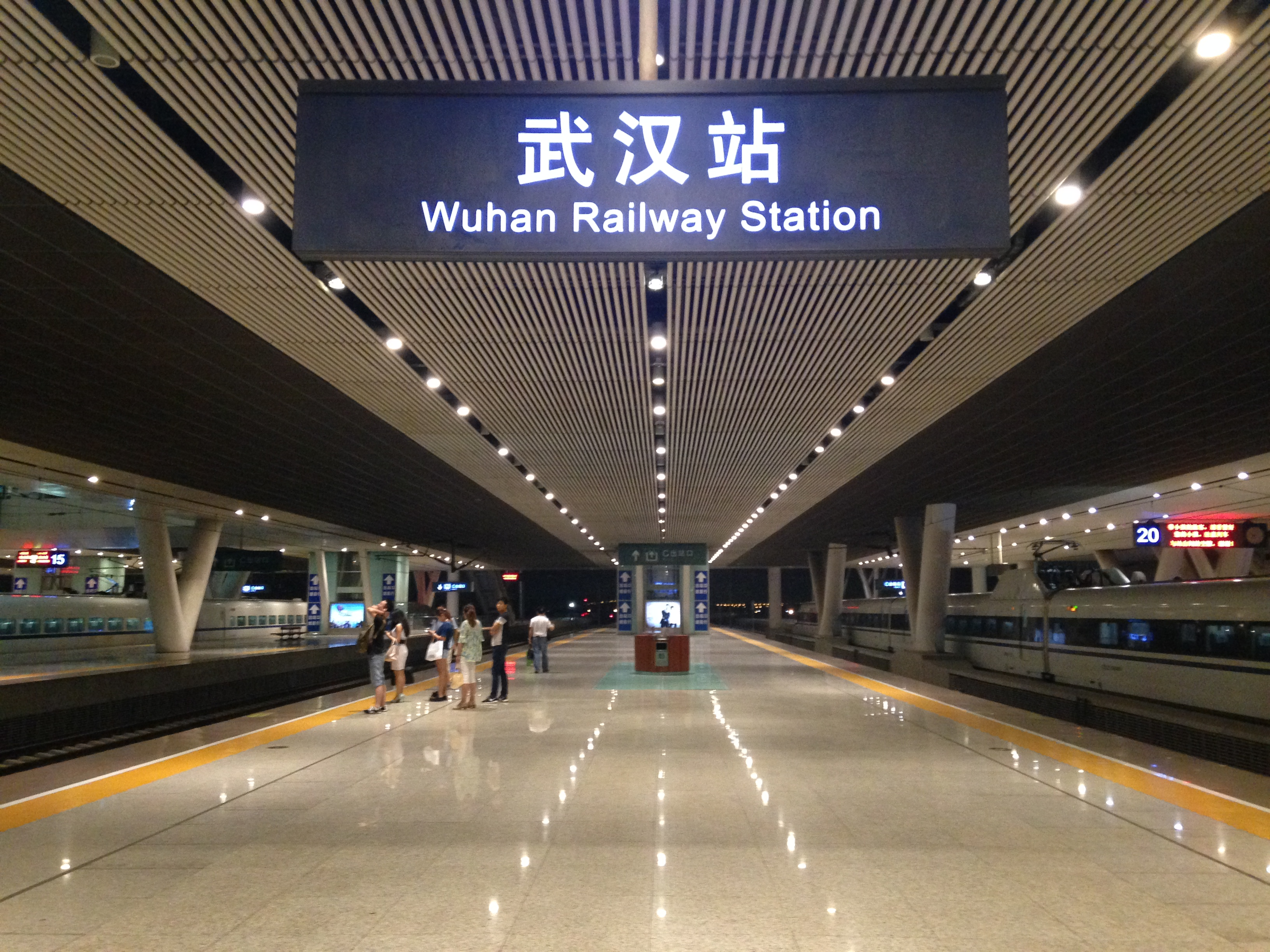 武漢駅のホーム